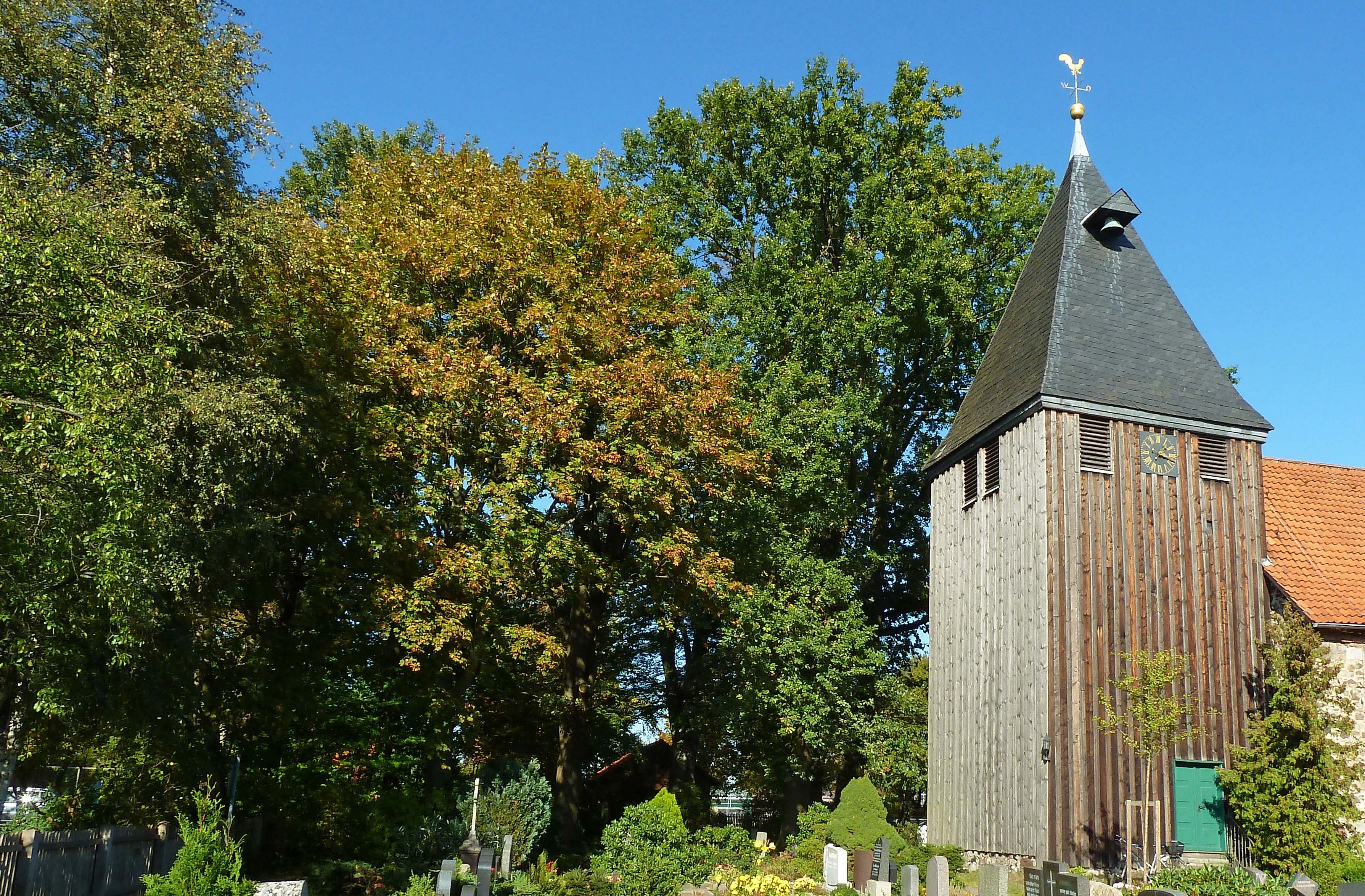 Rechts ist der Turm von der St.-Nikolai-Kirche, links das Naturdenkmal „Baumgruppe auf dem Kirchhof“ (ND-H 071) (Buche, Ahorn und Eichen) in Kirchhorst zu sehen.